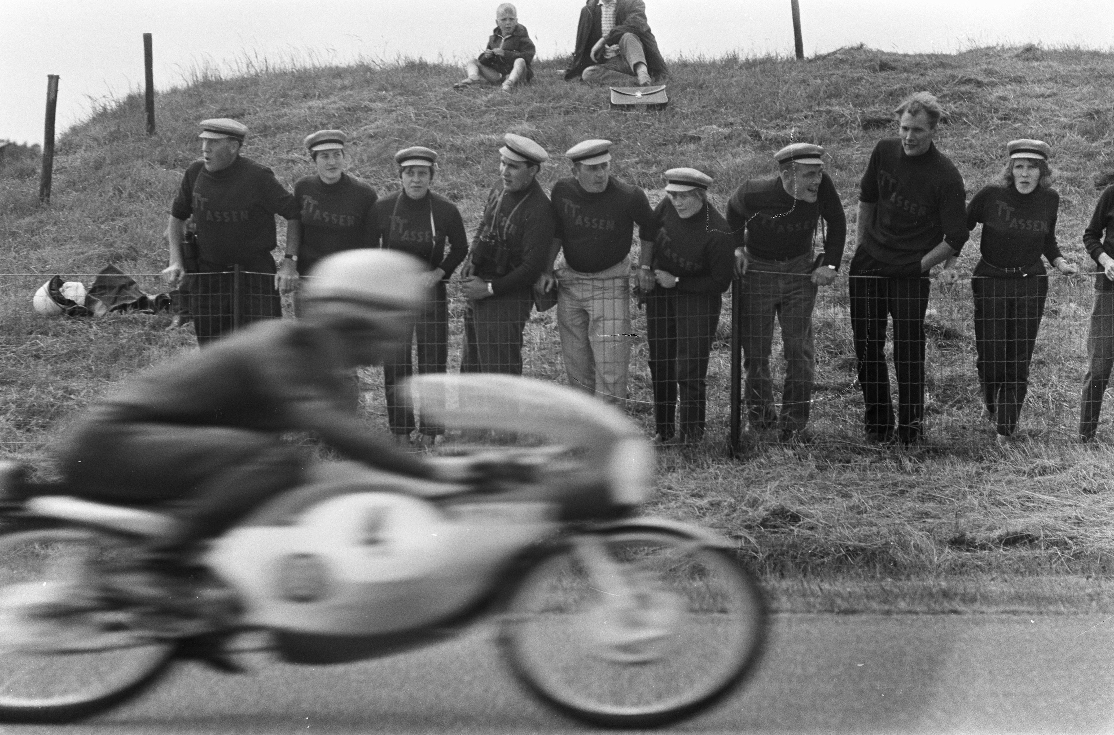 Collectie / Archief : Fotocollectie Anefo Reportage / Serie : TT Assen 1967 Beschrijving : TT Assen-truien gedragen door Duitse supporters Datum : 21 juni 1967 Locatie : Assen, Drenthe Trefwoorden : motorsport, publiek Fotograaf : Fotograaf Onbekend / Anefo Auteursrechthebbende : Nationaal Archief Materiaalsoort : Negatief (zwart/wit) Nummer archiefinventaris : bekijk toegang 2.24.01.05 Bestanddeelnummer : 920-4253